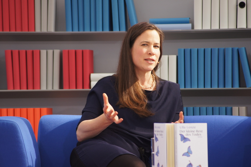 Ulla Lenze bei der Vorstellung von Der kleine Rest des Todes auf dem Blauen Sofa während der Leipziger Buchmesse 2012.